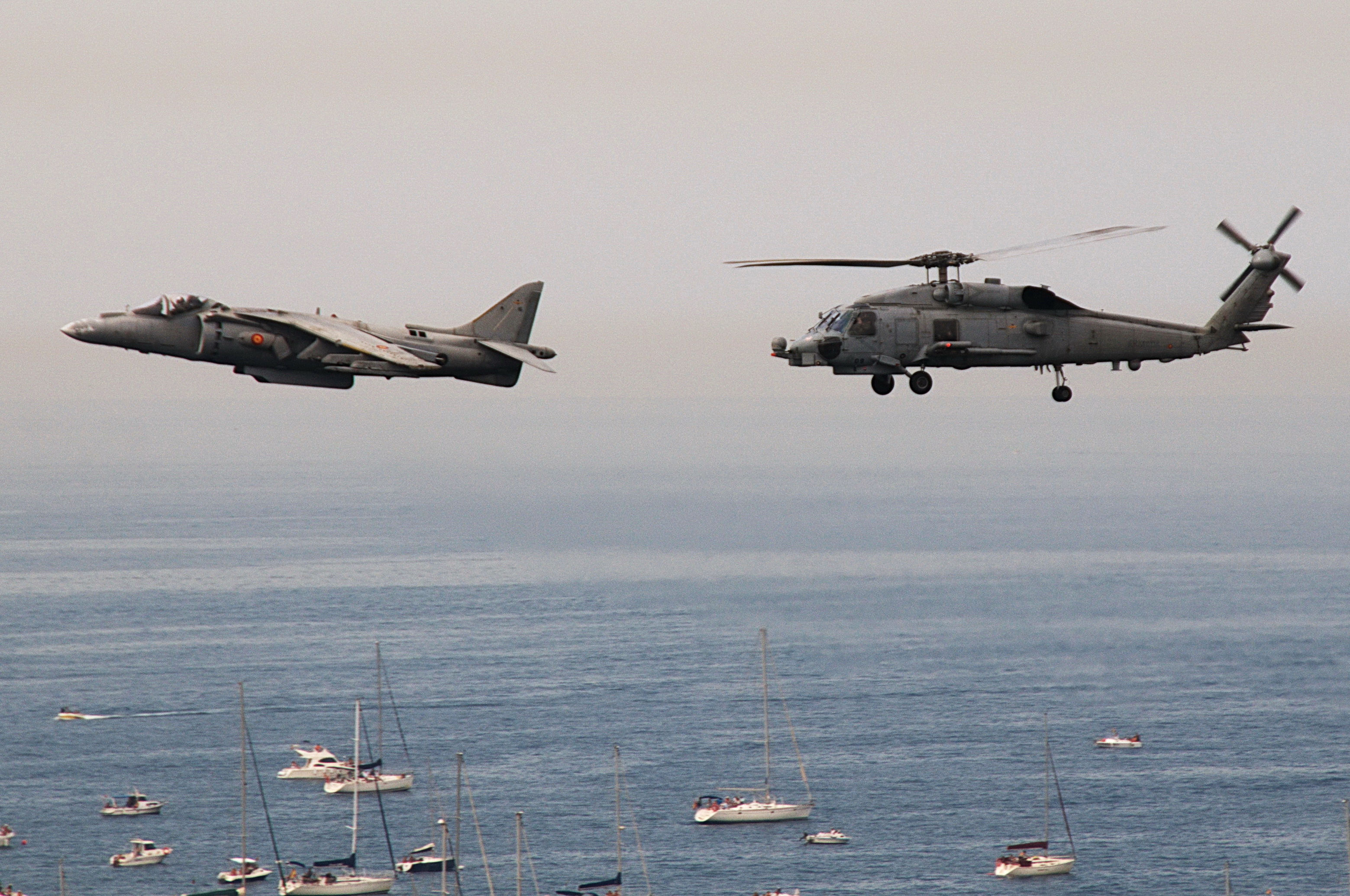 AV-8B Harrier II Plus y SH-60B LAMPS Mk III de la Armada Española en el Festival Aéreo de Cádiz de 2009.